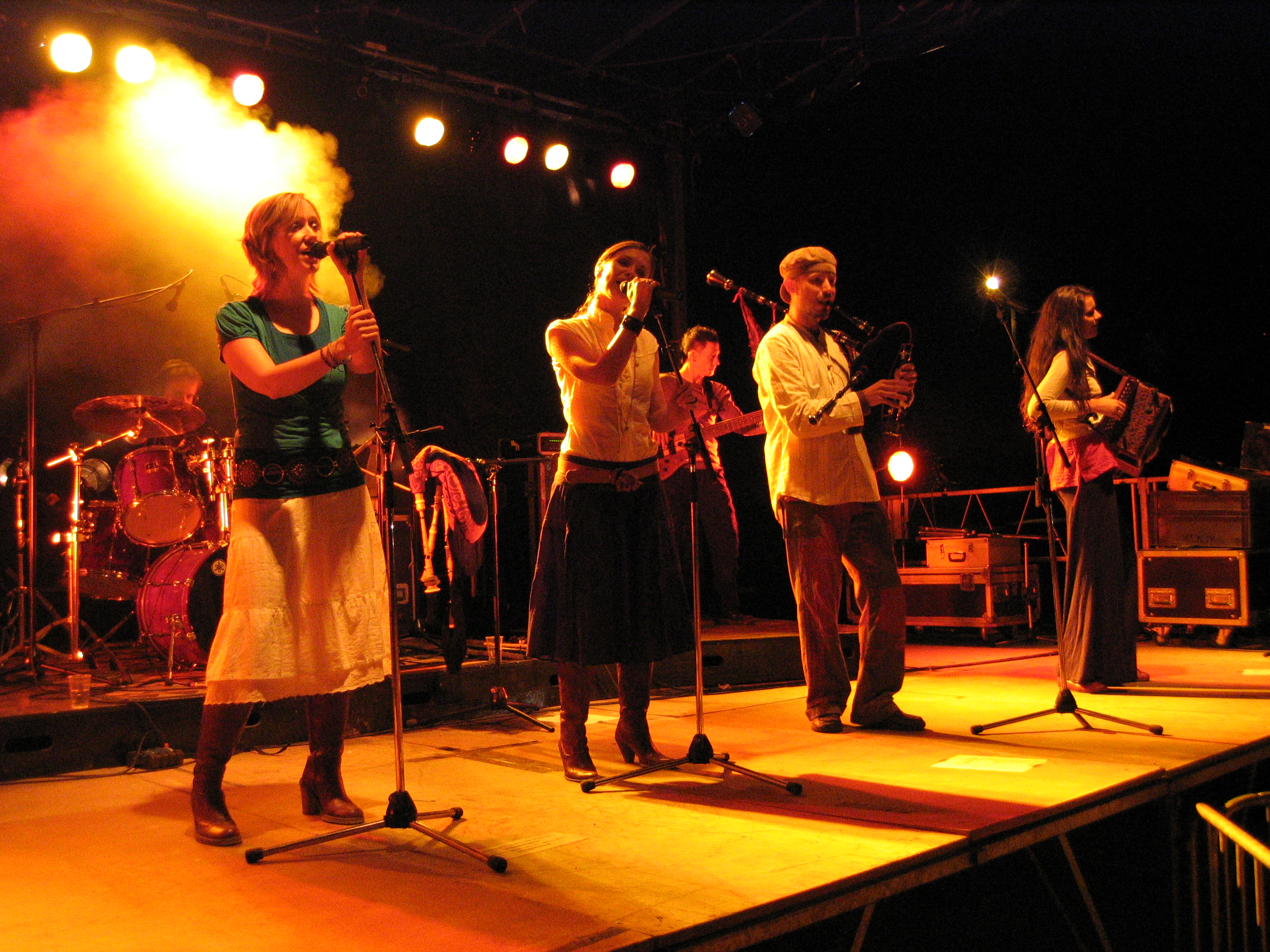 Urban trad Lampaul Guimiliau juillet 2006 France bretagne